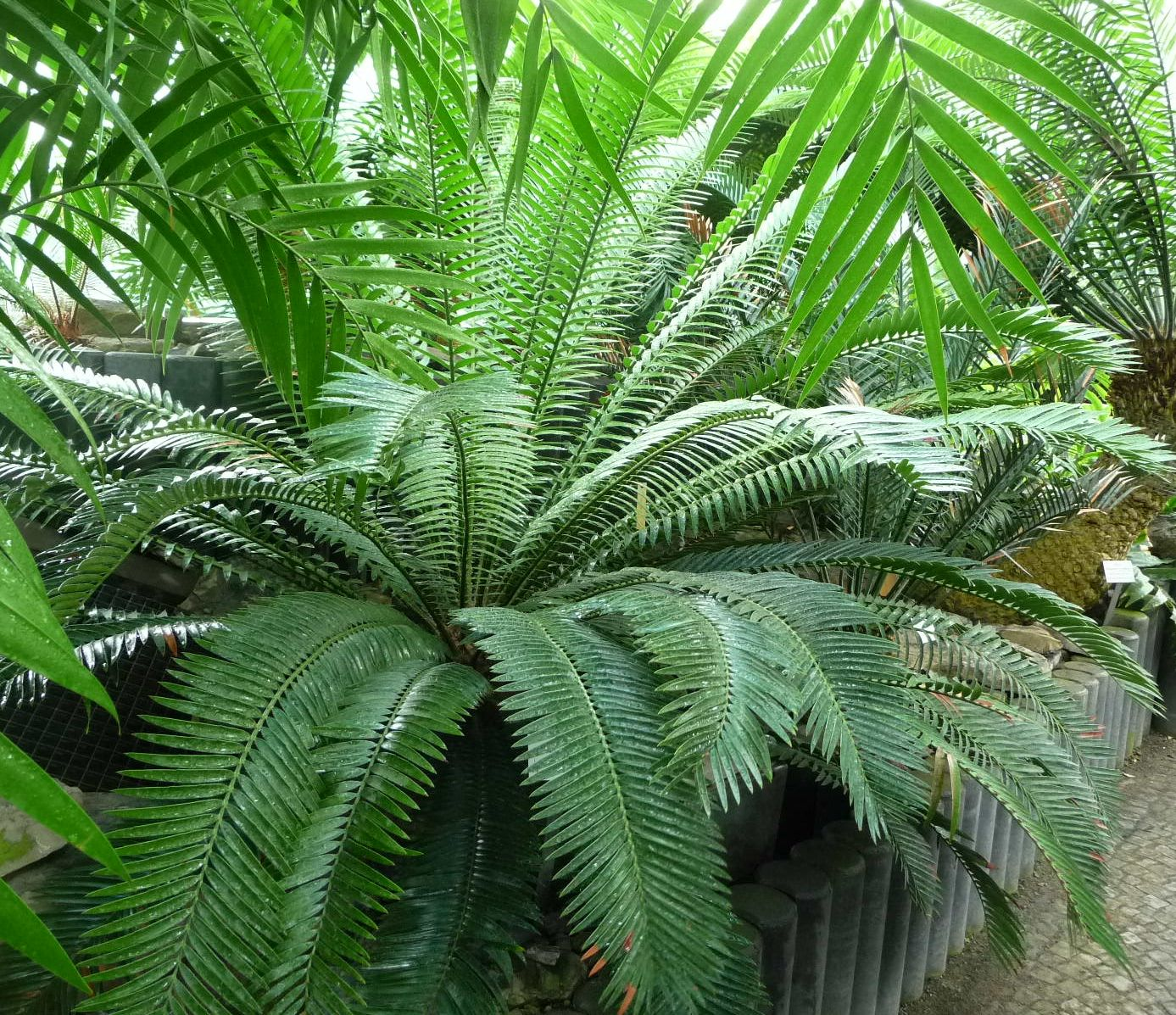 Encephalartos lebomboensis (Hamburgi pálmaház)